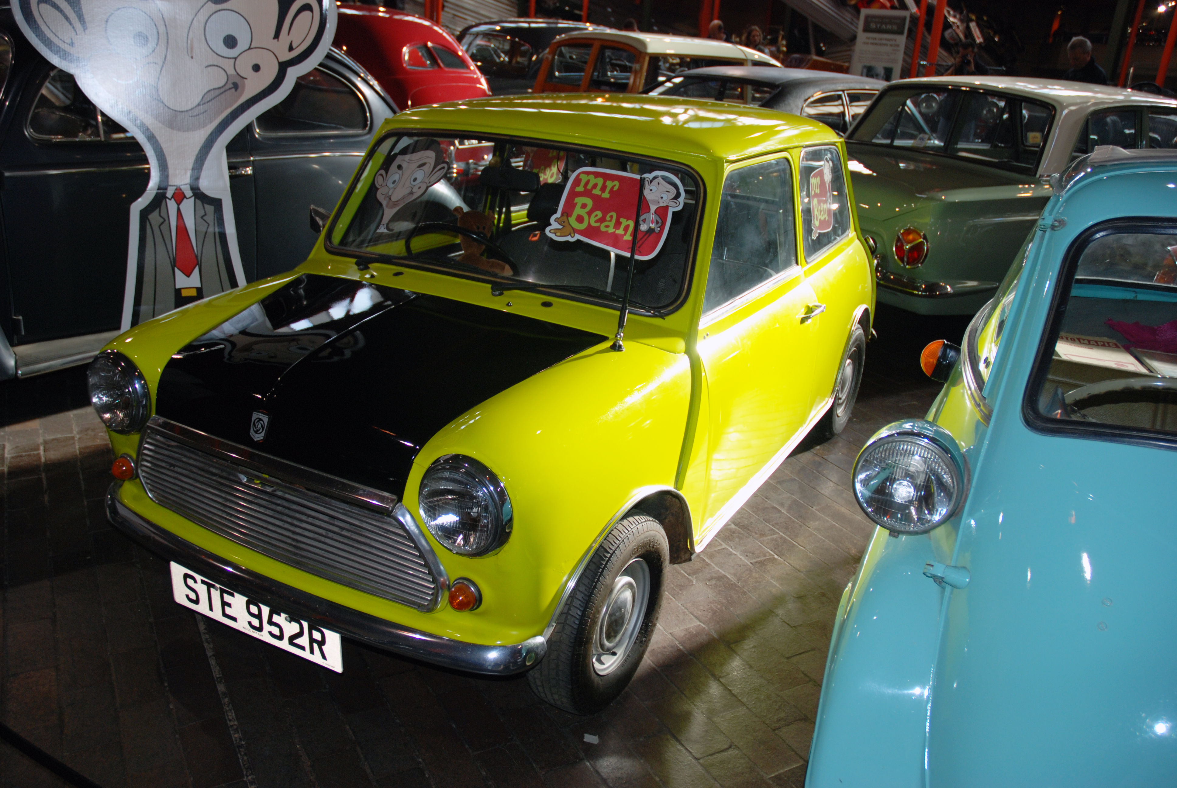 National Motor Museum,Beaulieu,Nov2007